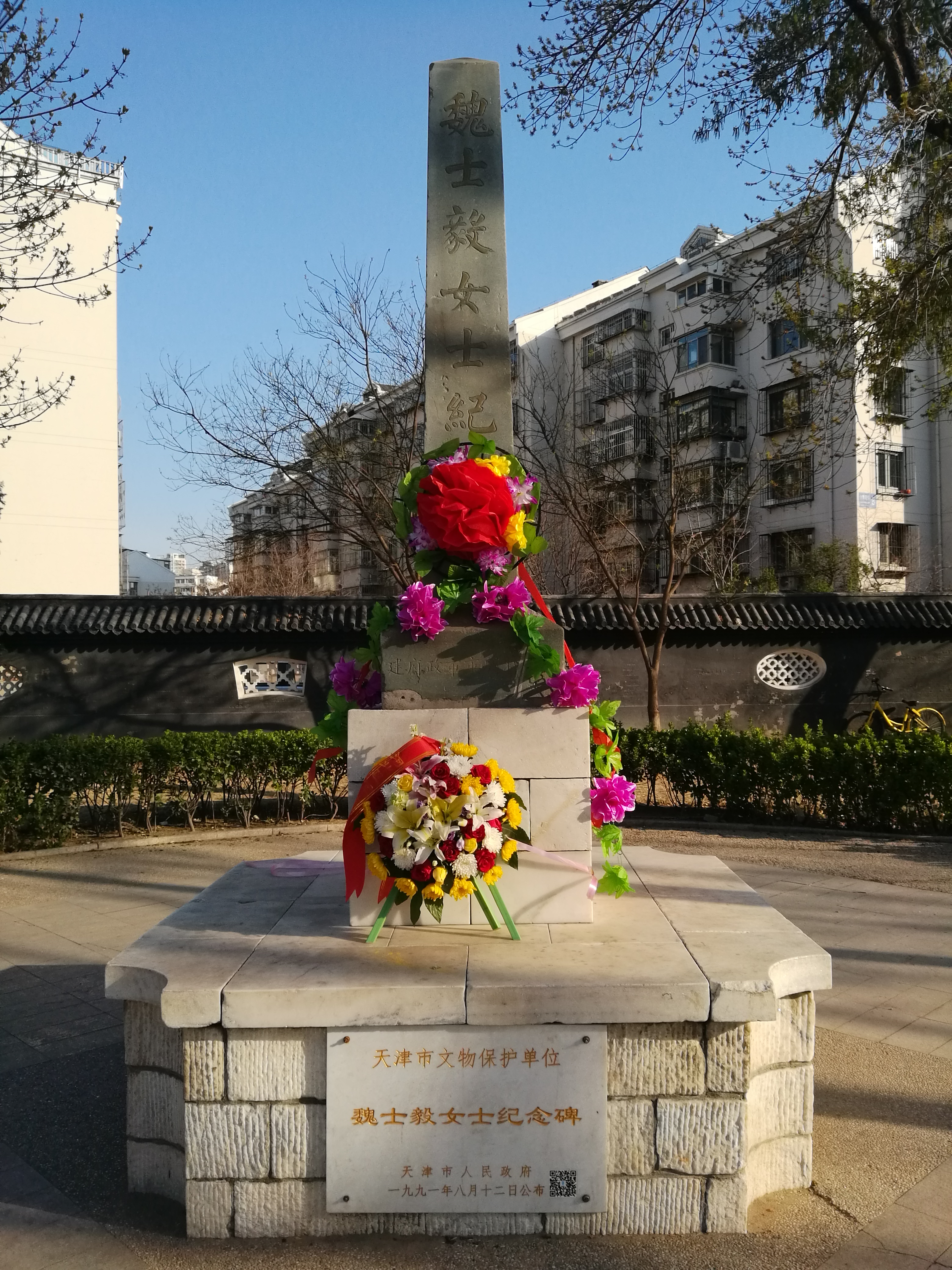 魏士毅女士纪念碑 天津市文物保护单位 所在 天津市河北区 分类 革命遗址及革命纪念建筑物 时代 1929年